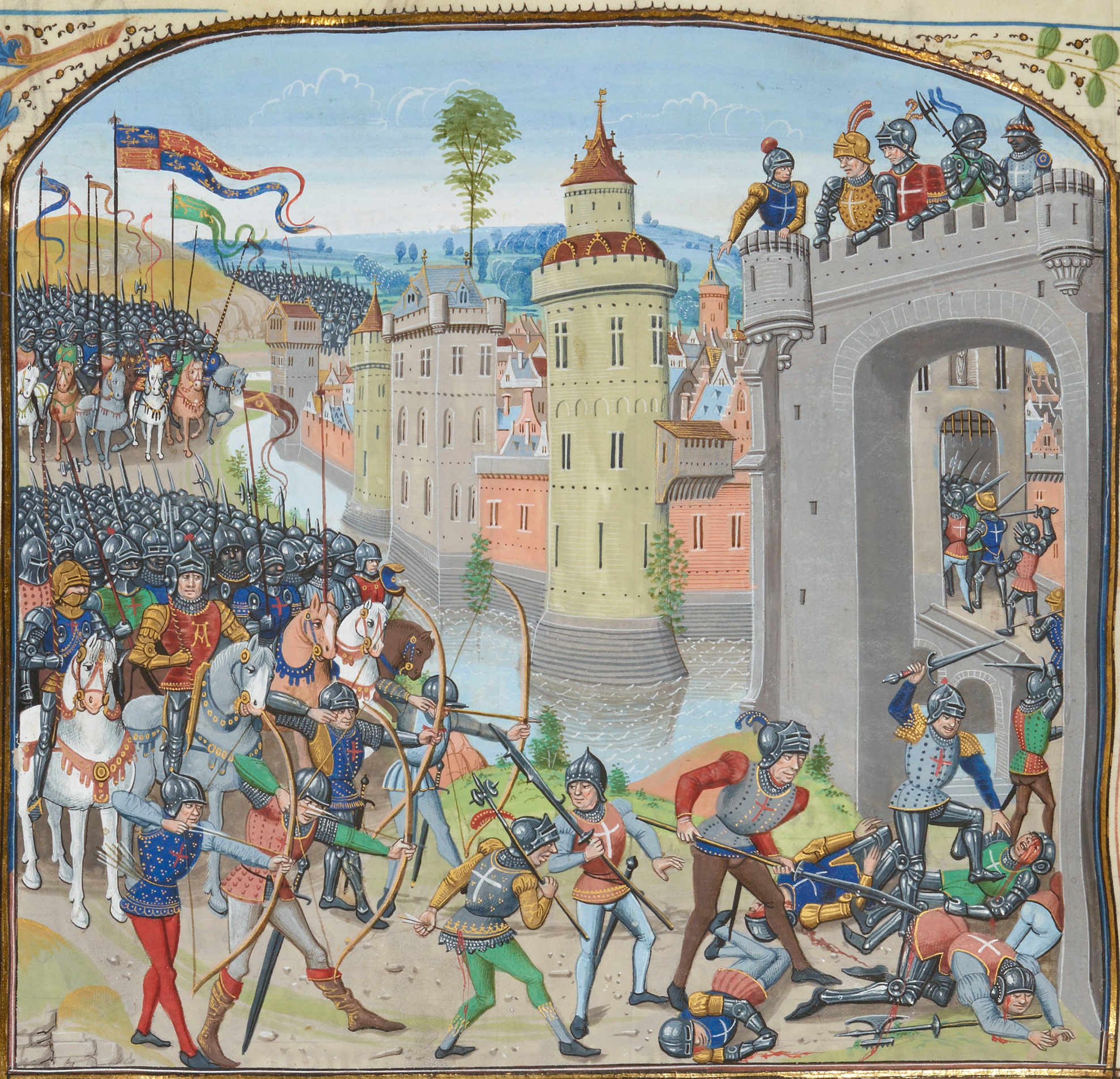 Prise de Caen en 1346. Verso from a manuscript of Froissart's Chronicle, Bibliothèque nationale de France, MS Fr. 2643, folio 97.